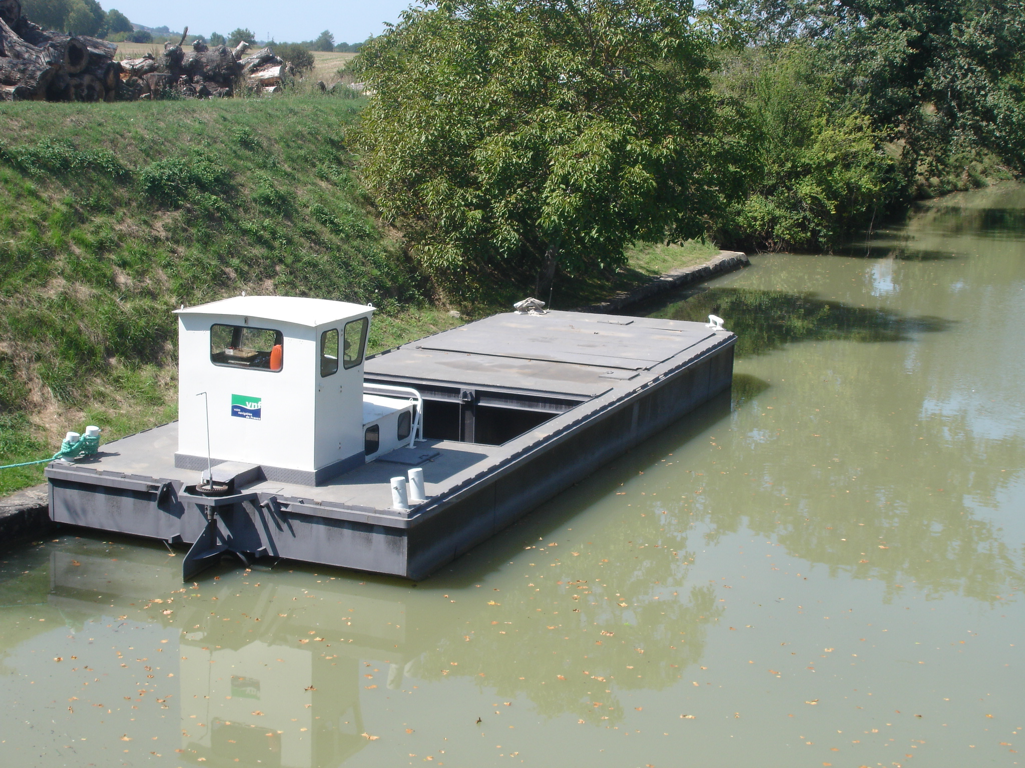 France, Haute-Garonne (31), Canal du Midi, port de Négra, péniche de nettoyage des voies navigables de France